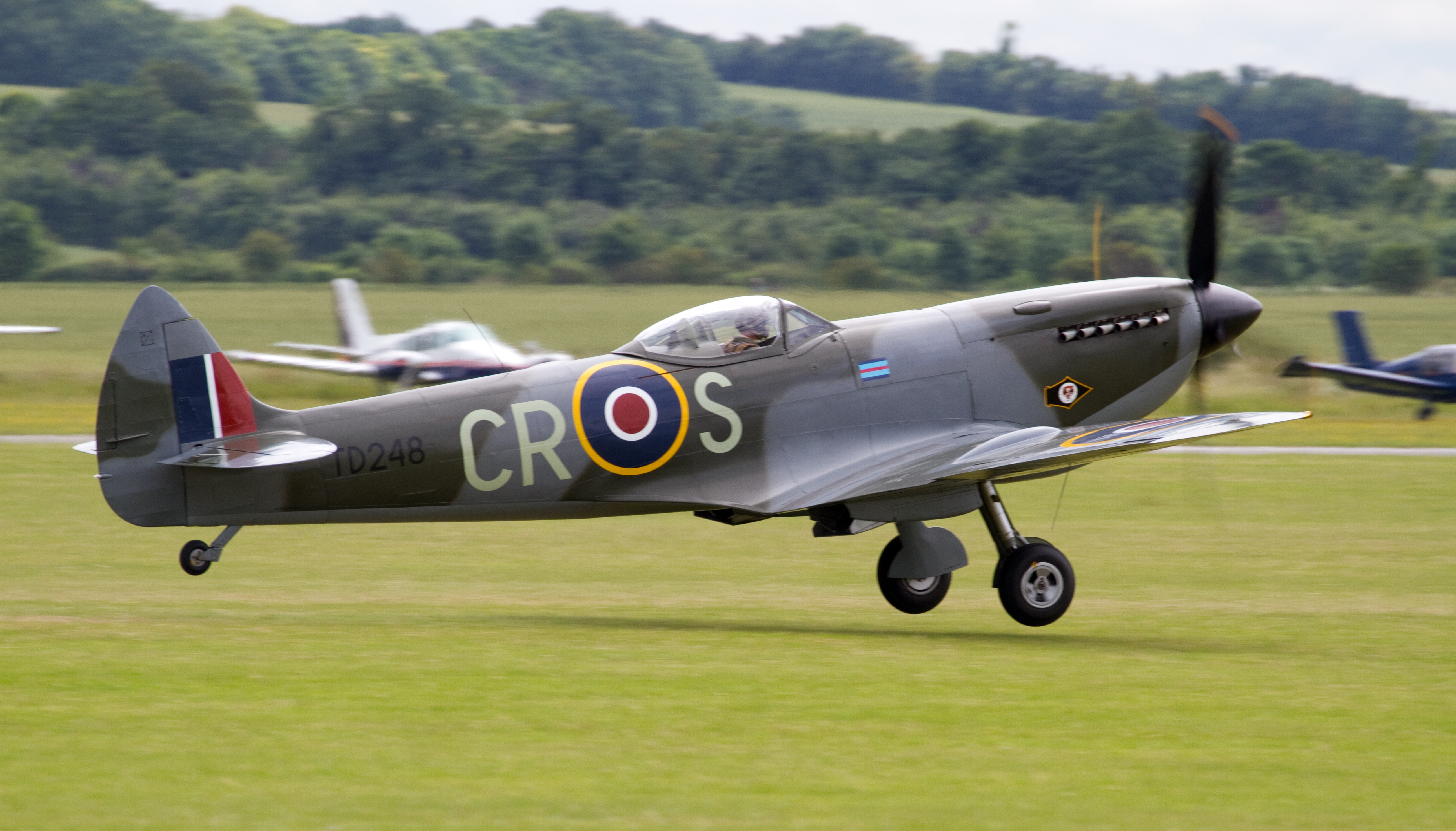 Spitfire LF XVIE TD248